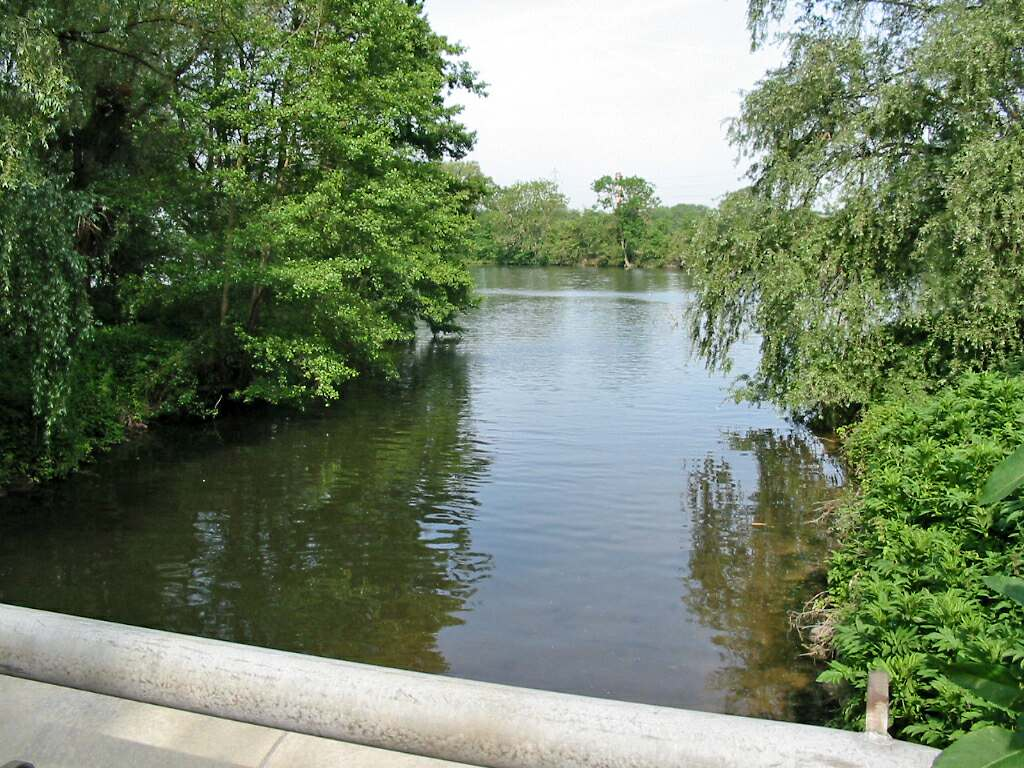 Épône (Yvelines - France). La Mauldre (au premier plan) à sa confluence avec la Seine (en arrière-plan). Vue vers l'ouest depuis le pont du chemin du Gibouin.